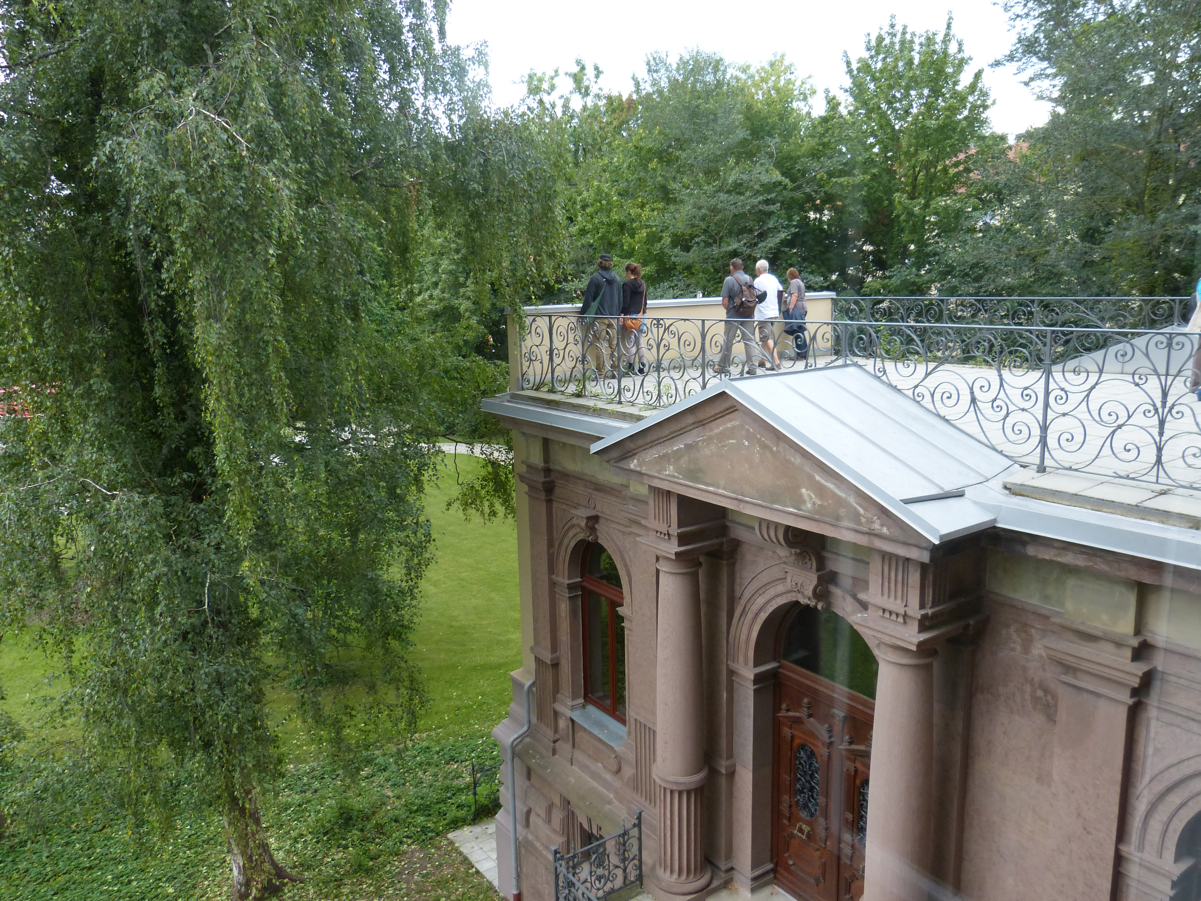 Die Villa Haag in Augsburg.